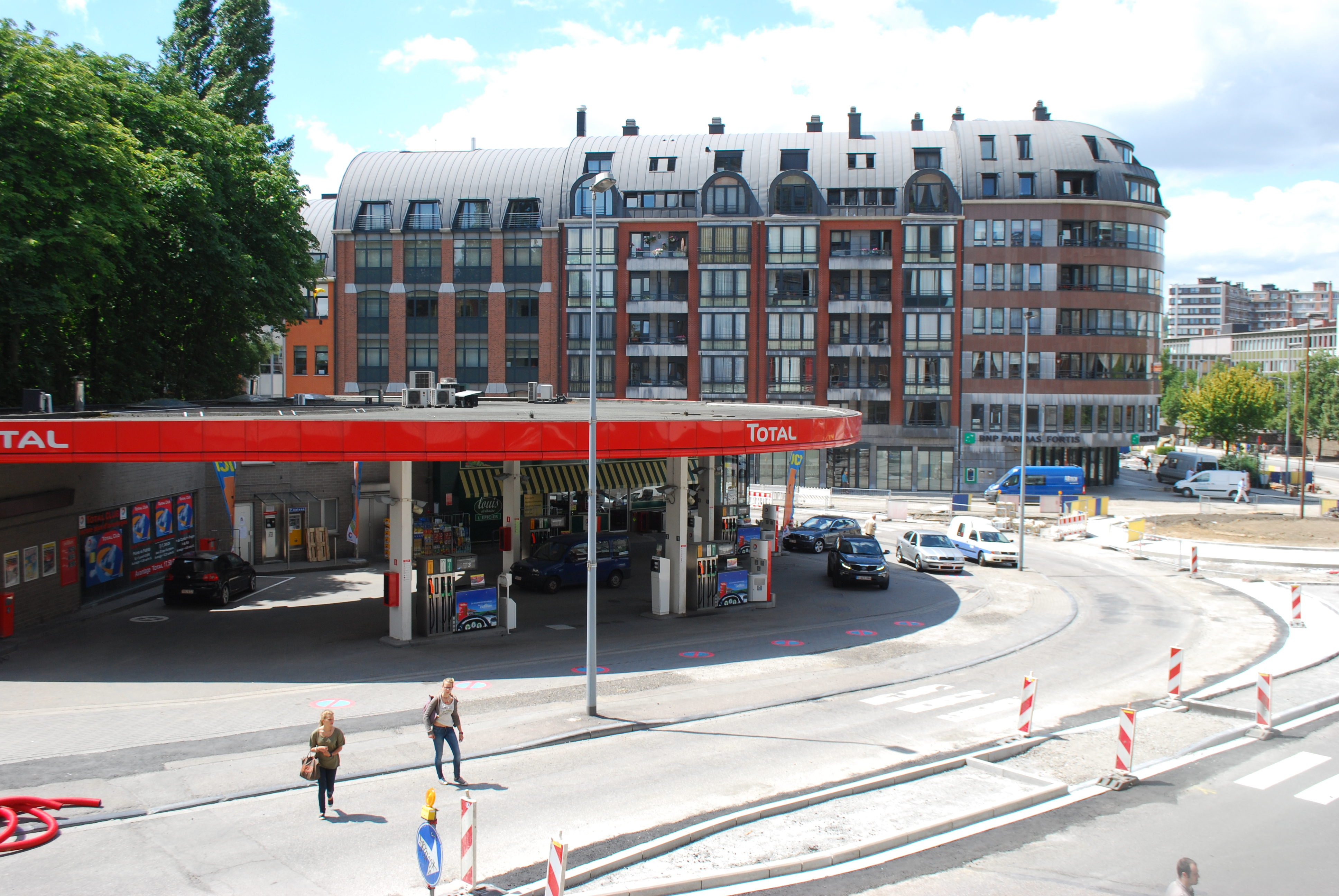 Station-service Total, rue des Prémontrés à Liège.